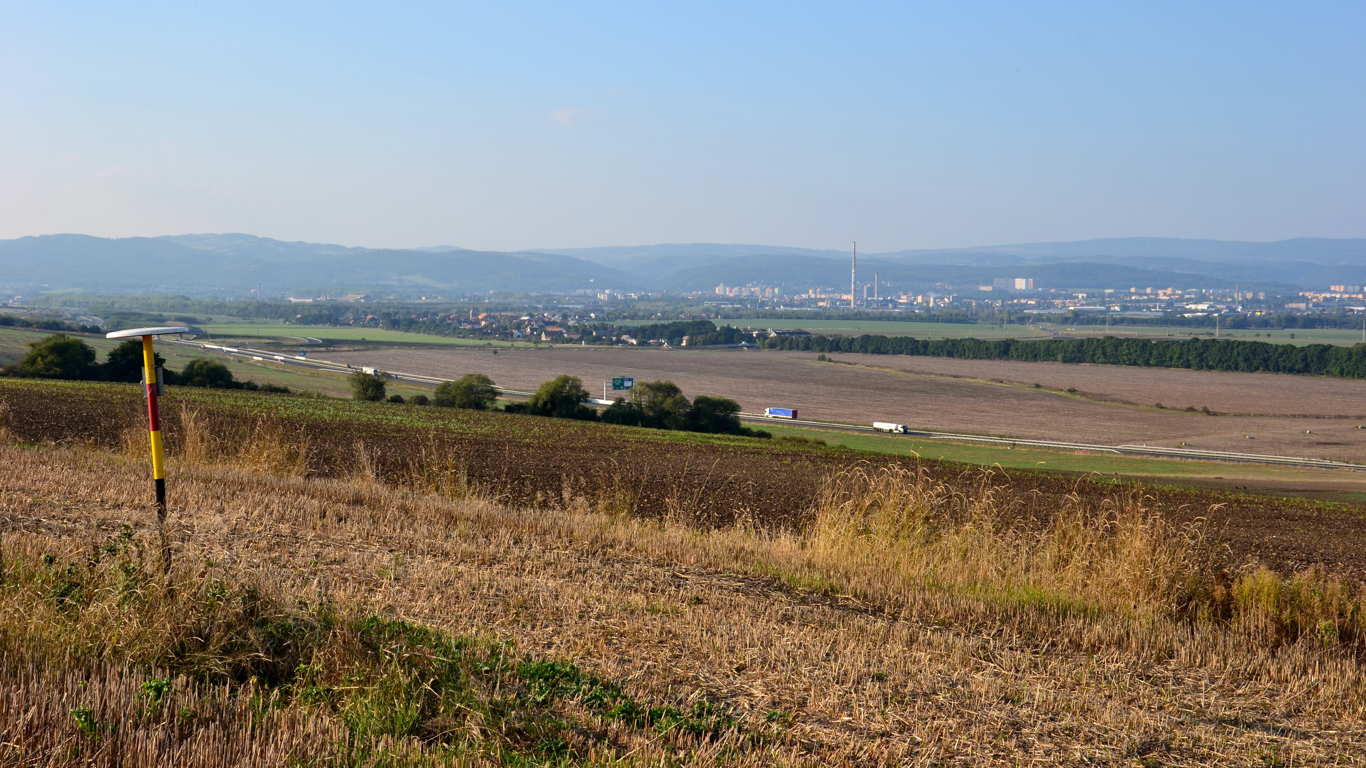 Jižní část Údlické kotliny s Chomutovem v pozadí